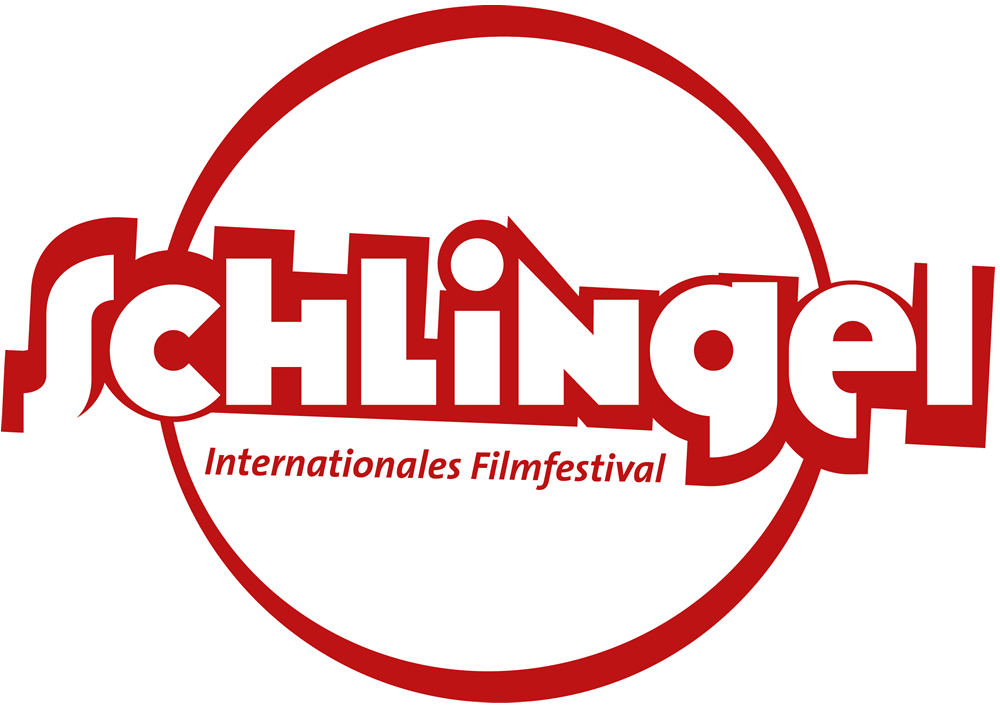 Logo des Internationalen Filmfestivals SCHLINGEL